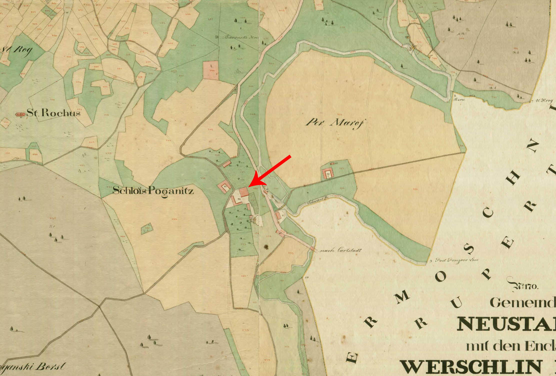 Franciscejski kataster za Kranjsko, 1823-1869